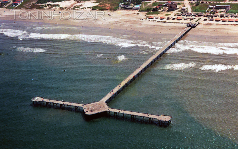 Plataforma de Pesca de Mongaguá - Aérea, por Toninho Izar